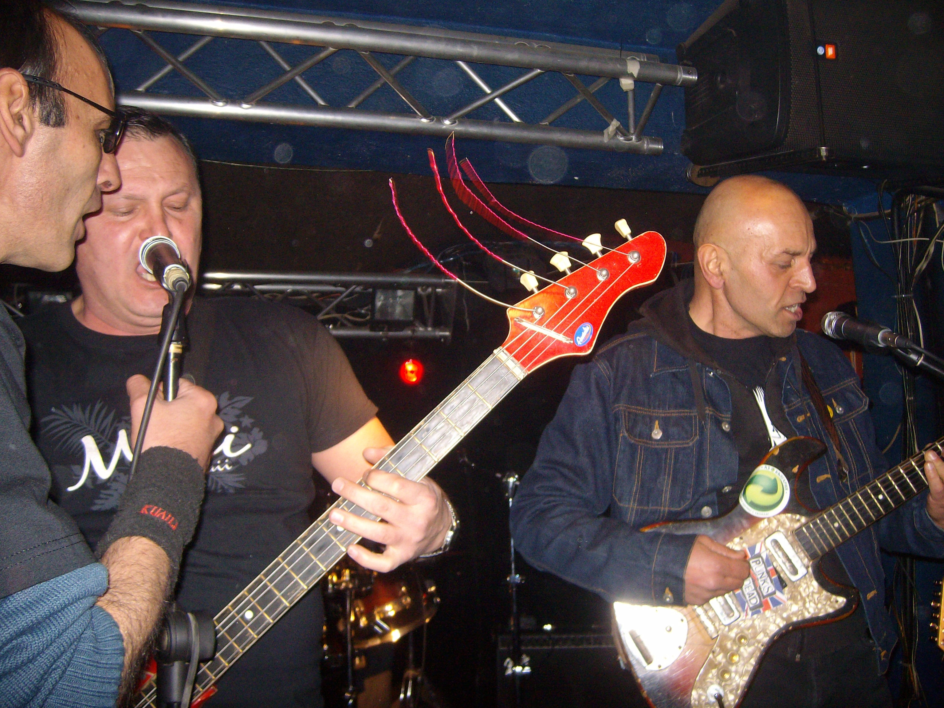 концерт